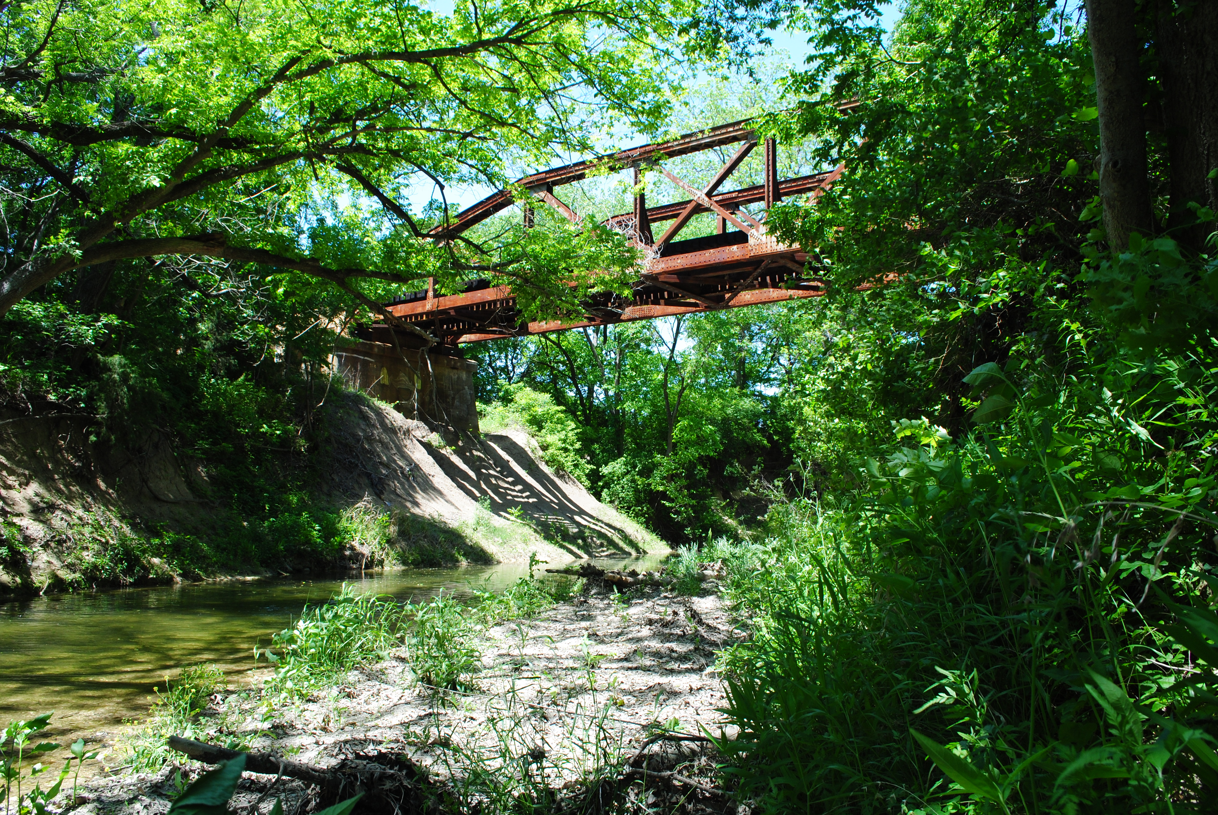 Truss bridge spanning Red Oak Creek.